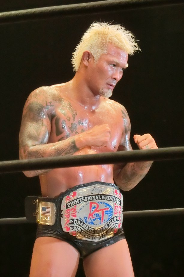 2015年８月23日KO-D無差別級第54代王者に